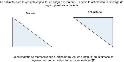 La materia y la antimateria es especular en carga